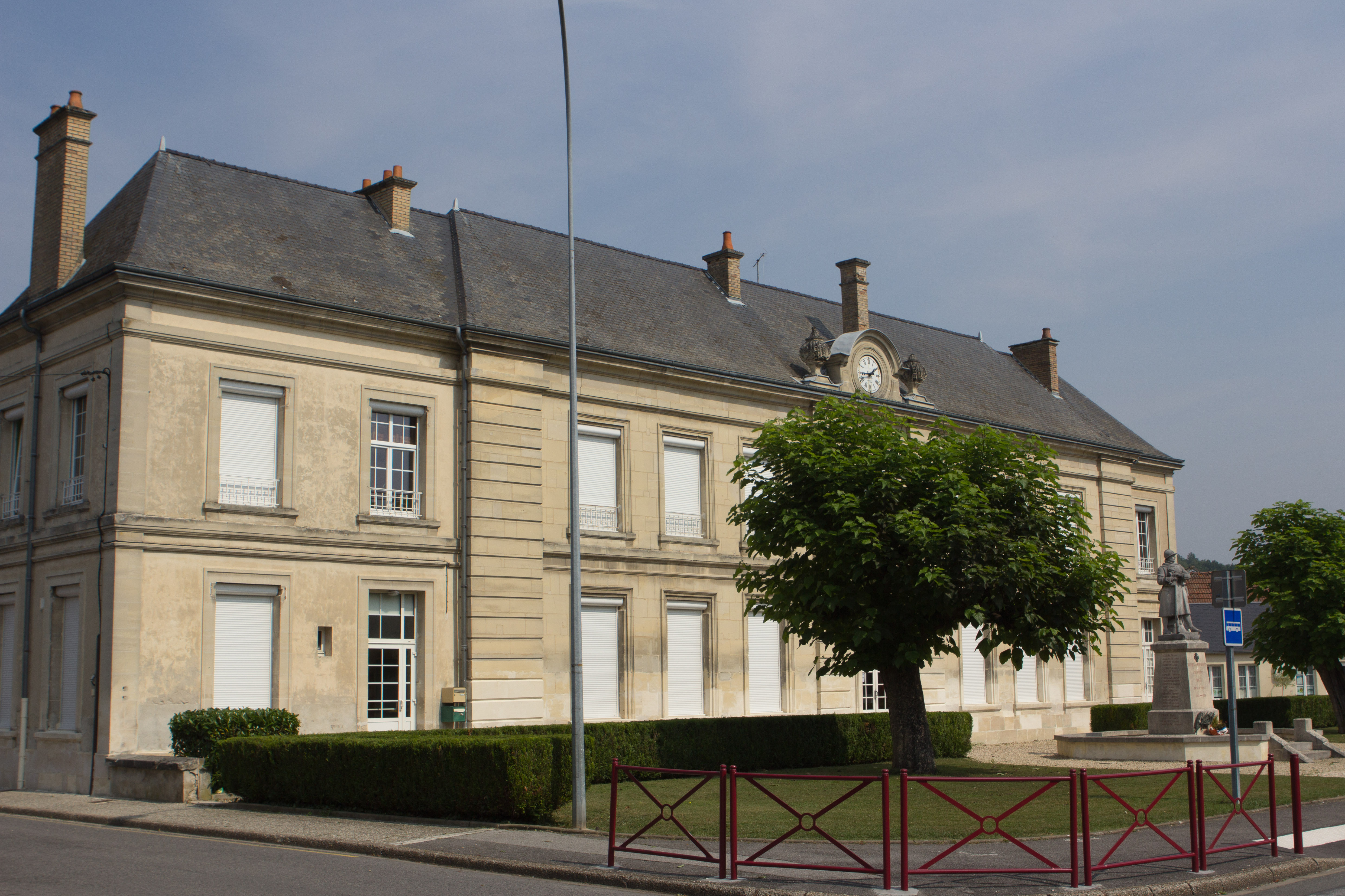 Ecole de Bruyères-et-Montbérault / Bruyères-et-Montbérault, Aisne, France